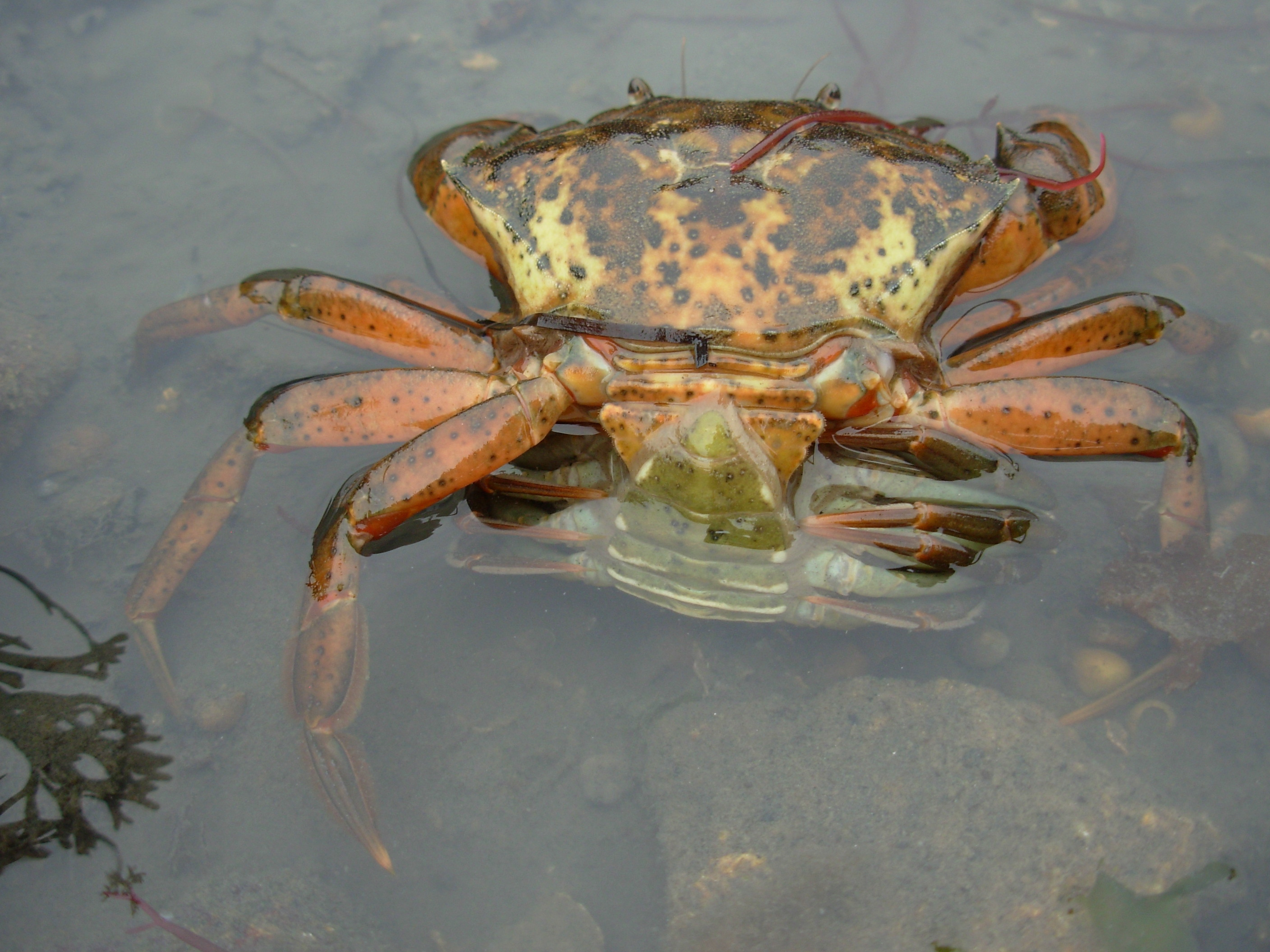 Accouplement, vu par l'arrière, montrant les positions respectives de l'abdomen de la femelle (vert) et du mâle (orangé).